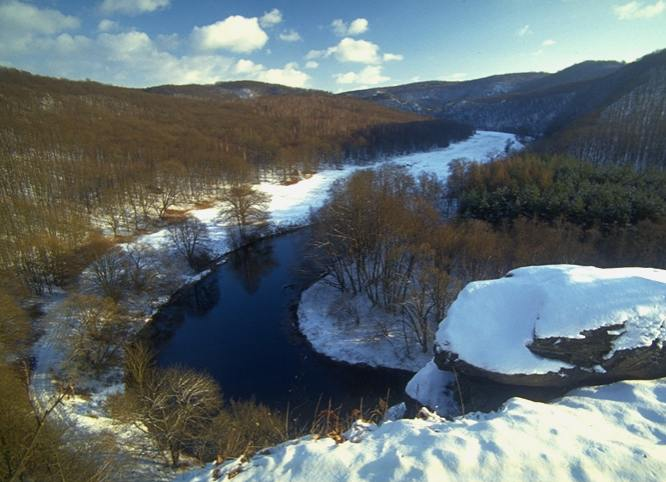 Die Thaya beim Umlaufberg im Nationalpark Thayatal